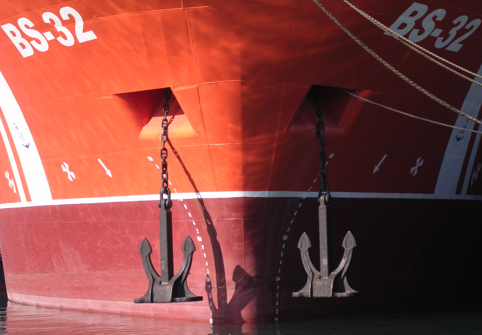 Sociedad de Salvamento y Seguridad Marítima